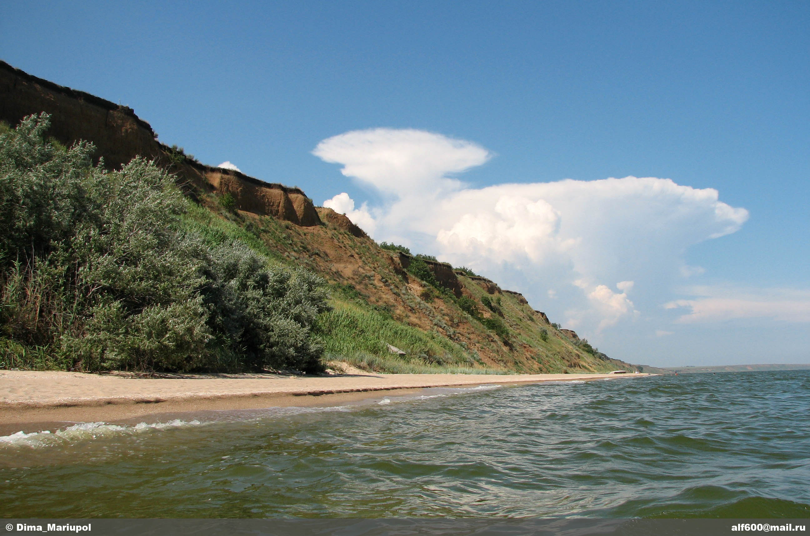 Снимок сделан в районе села Новопетровка на побережье Азовского моря